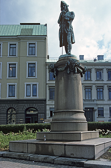 Jonas Alströmer, staty av John Börjeson 1905. Motiv: Lilla torget Nyckelord: Riksintressen Kategori: Torgmiljö, Skulpturer Jonas Alströmer, staty av John Börjeson 1905.